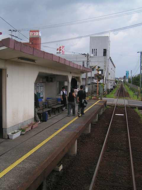 島鉄本社前駅 投稿者が撮影(2006/08/27)